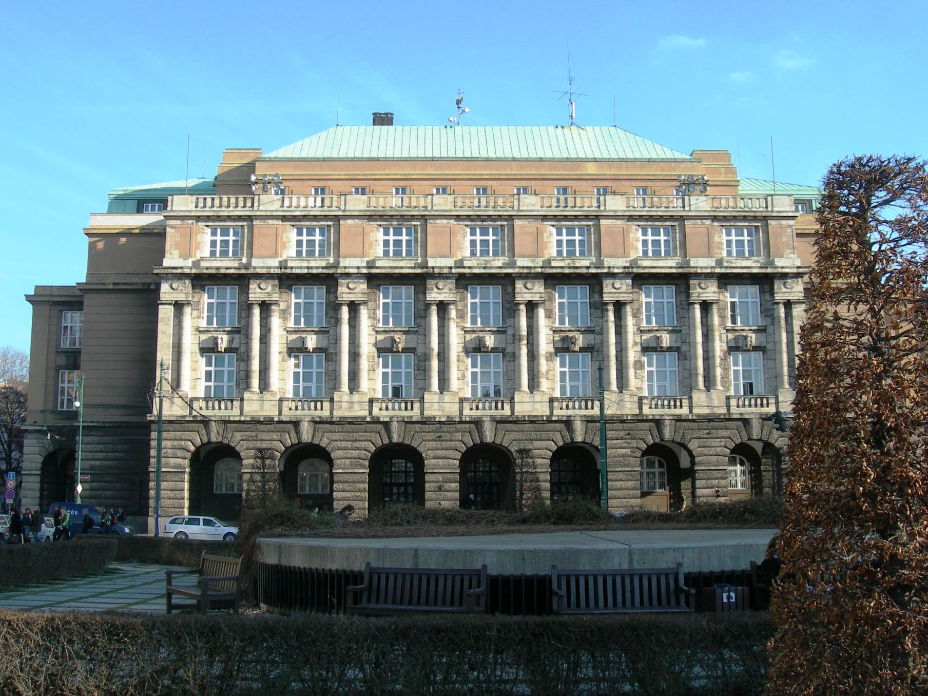 Filozoficka fakulta UK v Praze.)